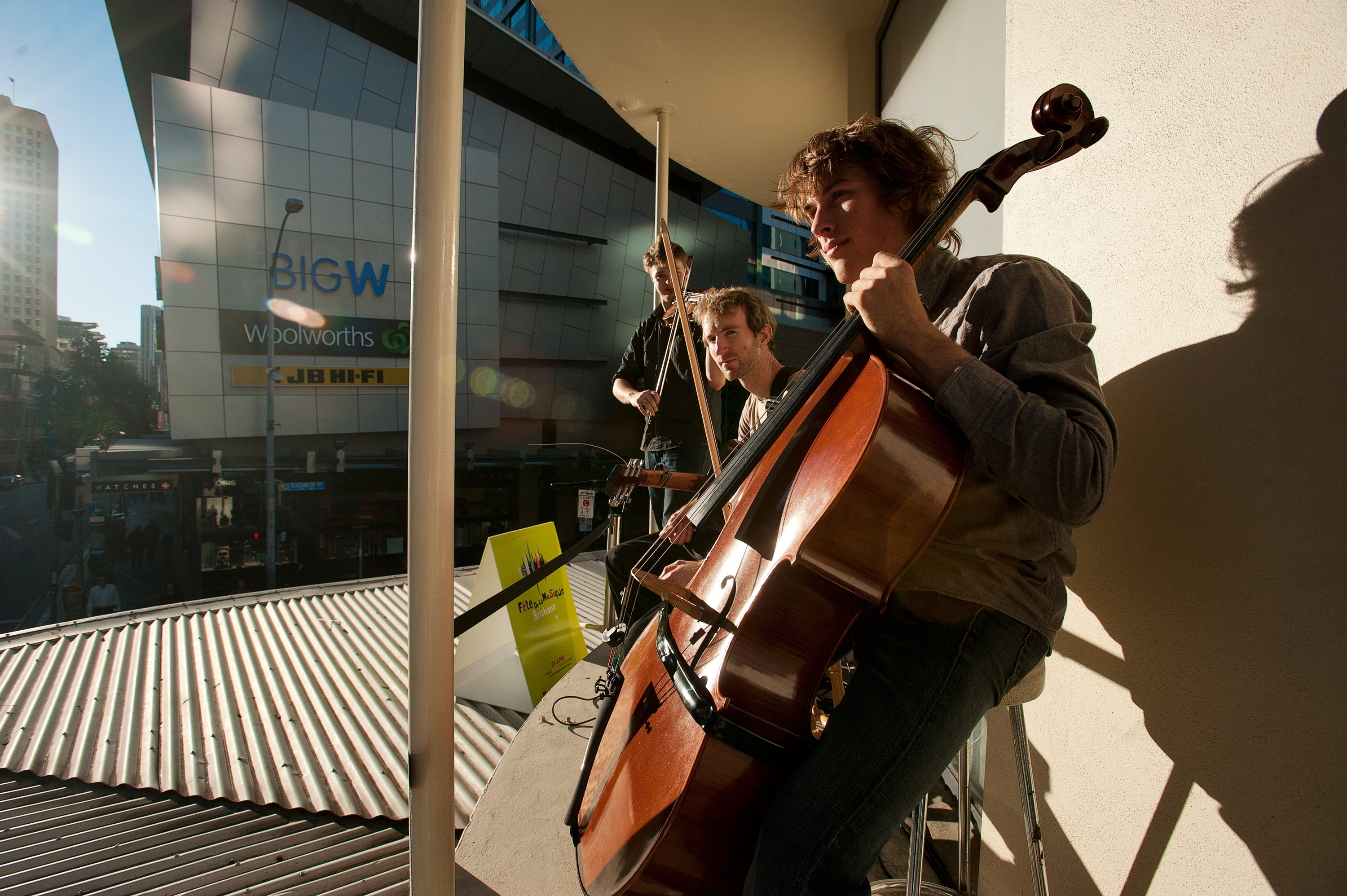 Fete de la Musique